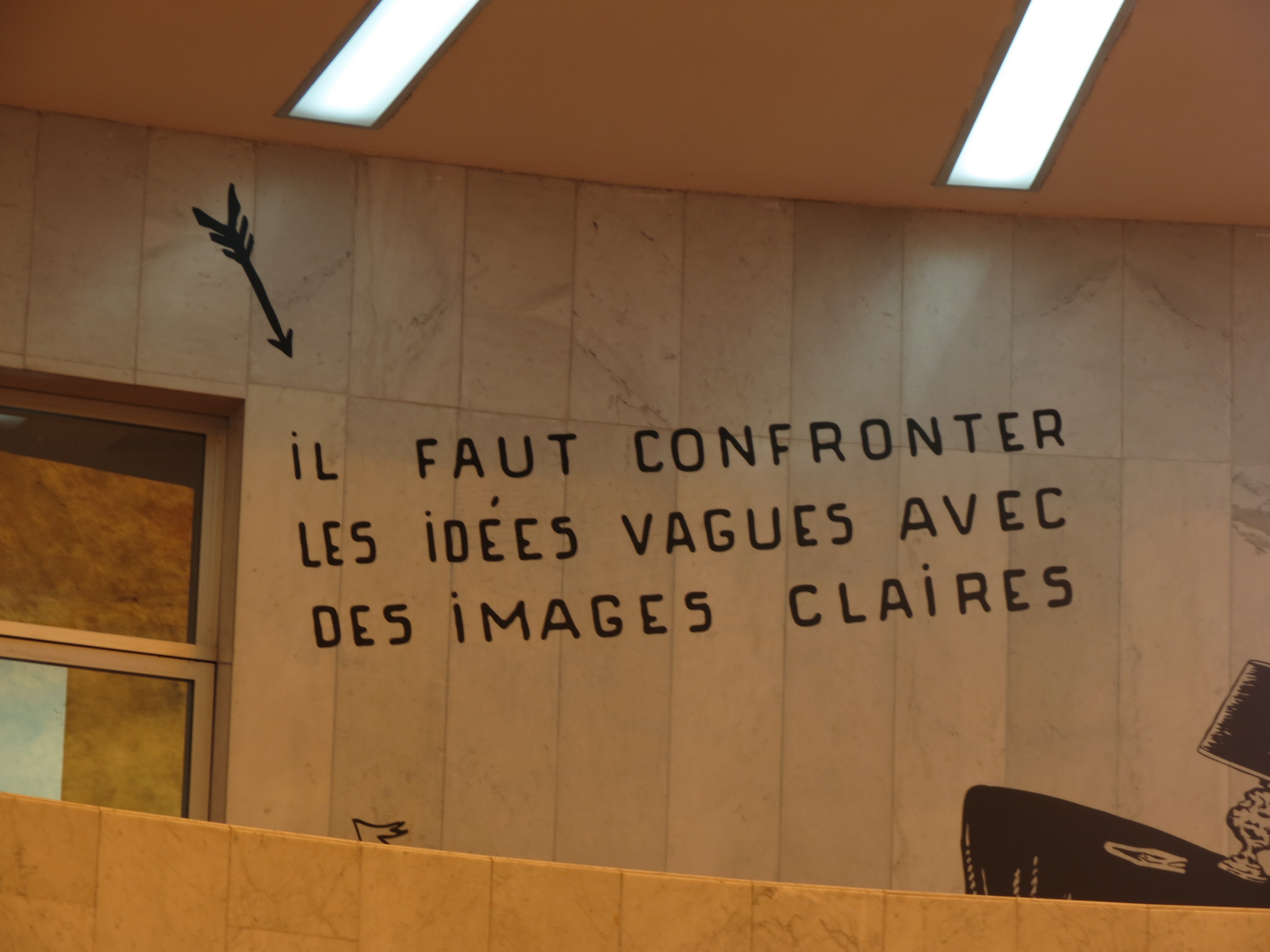 Detalles del Museo de Arte Moderno de la Ciudad de México